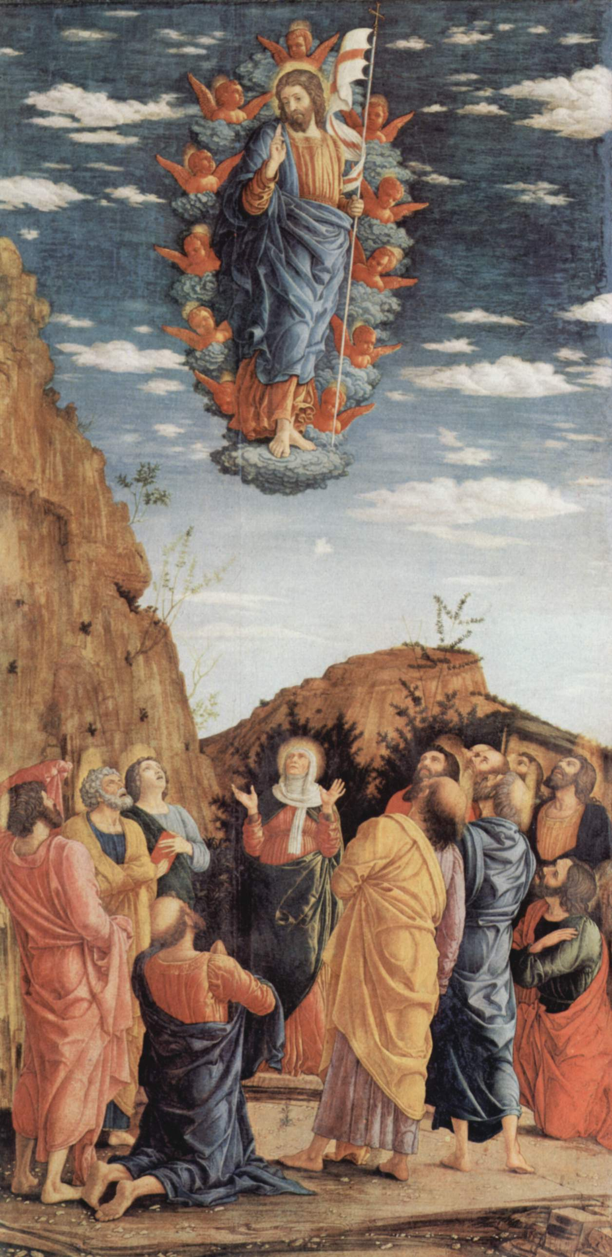 Altarretabel der Palastkapelle des Herzogs von Mantua